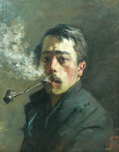 Autoritratto, olio su tela, 66 x 52.5 cm. Musei civici, Monza